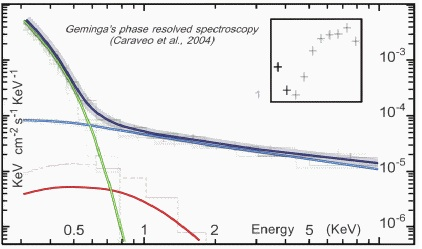 Anni 2000 - Fenomenologia X - 3